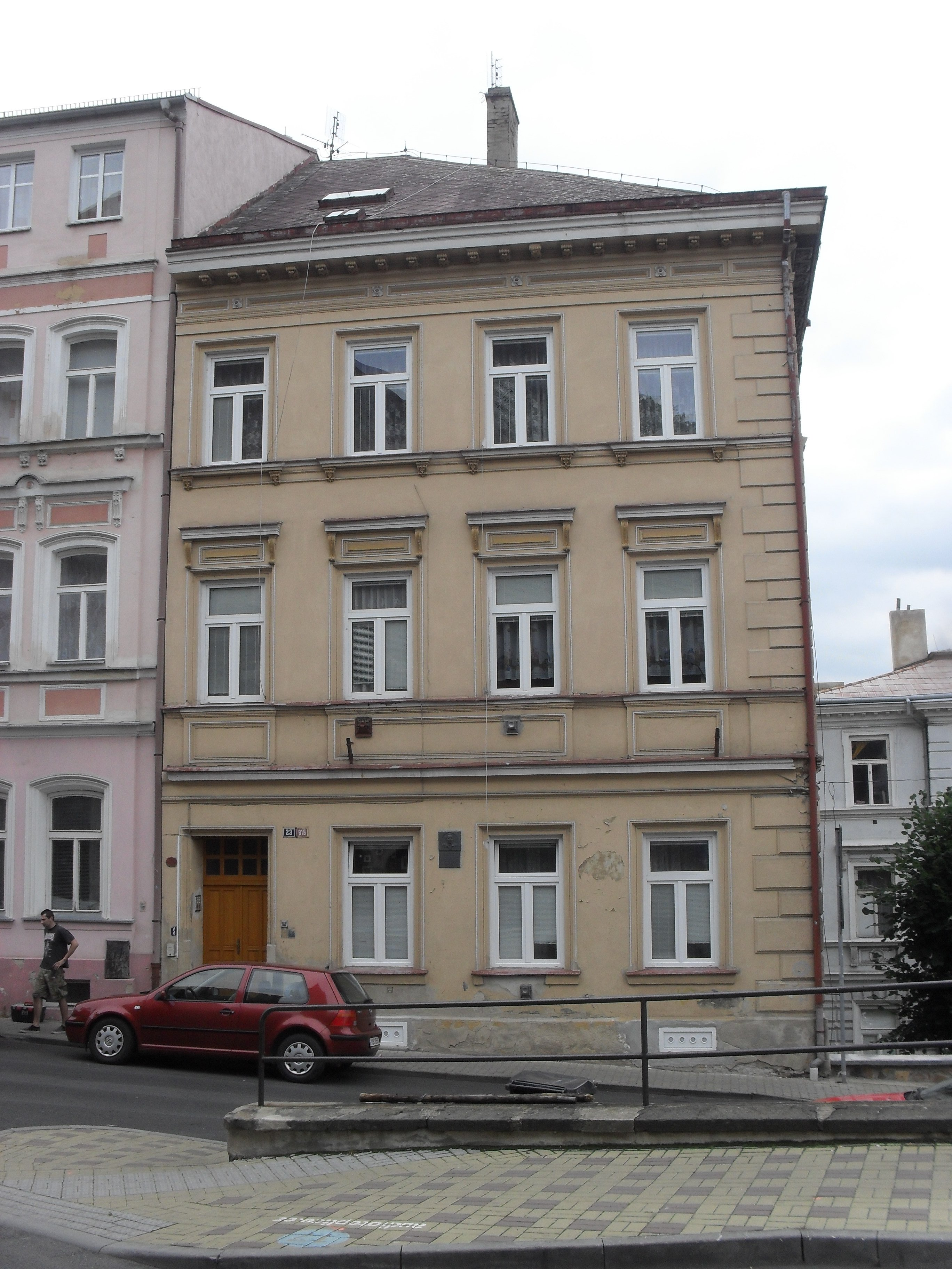 Česky: Rodný dům Michala Mareše v Teplicích